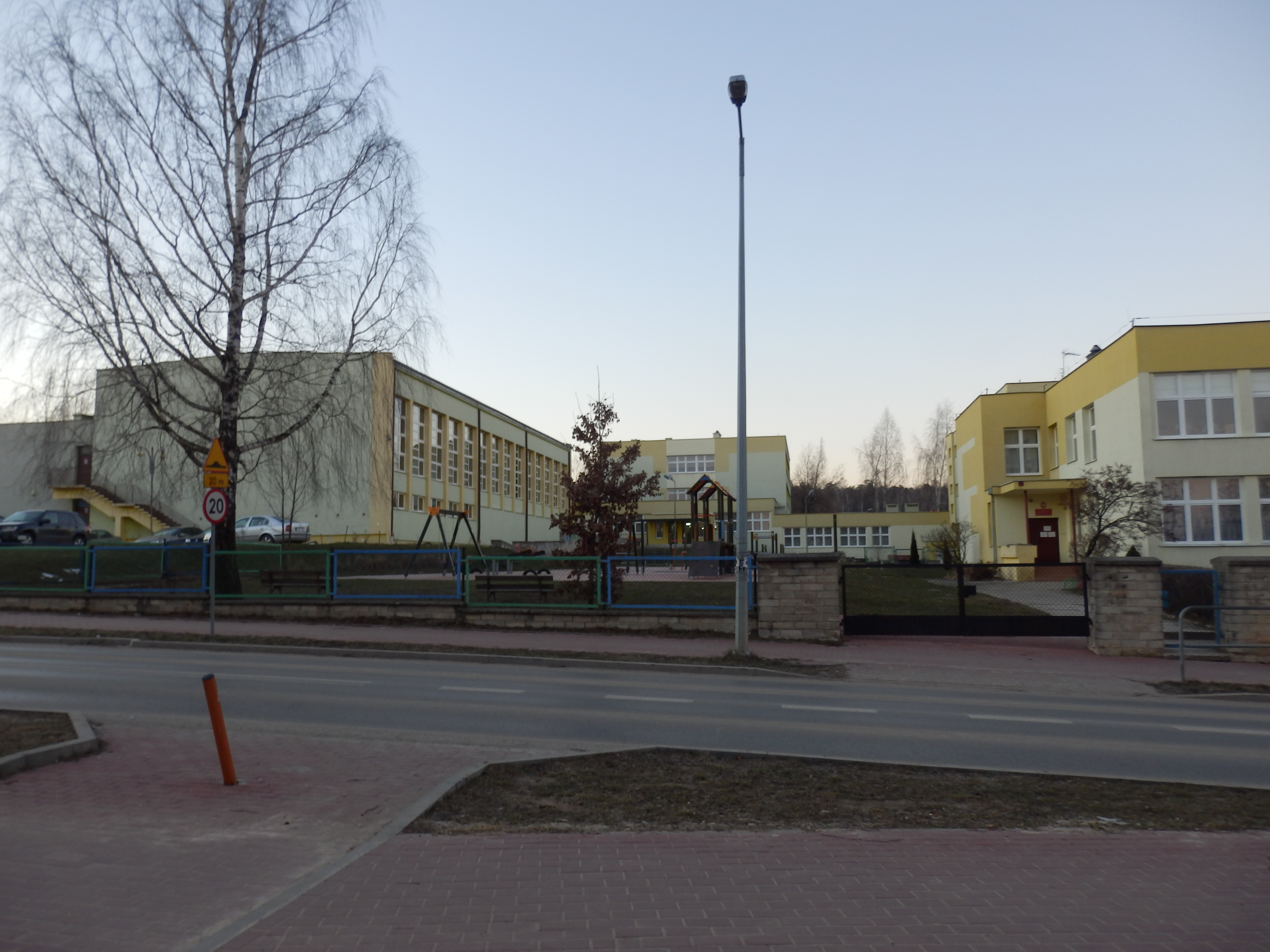 Widok na Zespół Placówek Oświatowych nr 1 w Skarżysku-Kamiennej od ulicy Spółdzielczej.